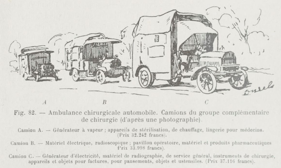 Groupe complémentaire d'une auto-chir. Source : Enseignements chirurgicaux de la Grande guerre (front occidental) (1919)